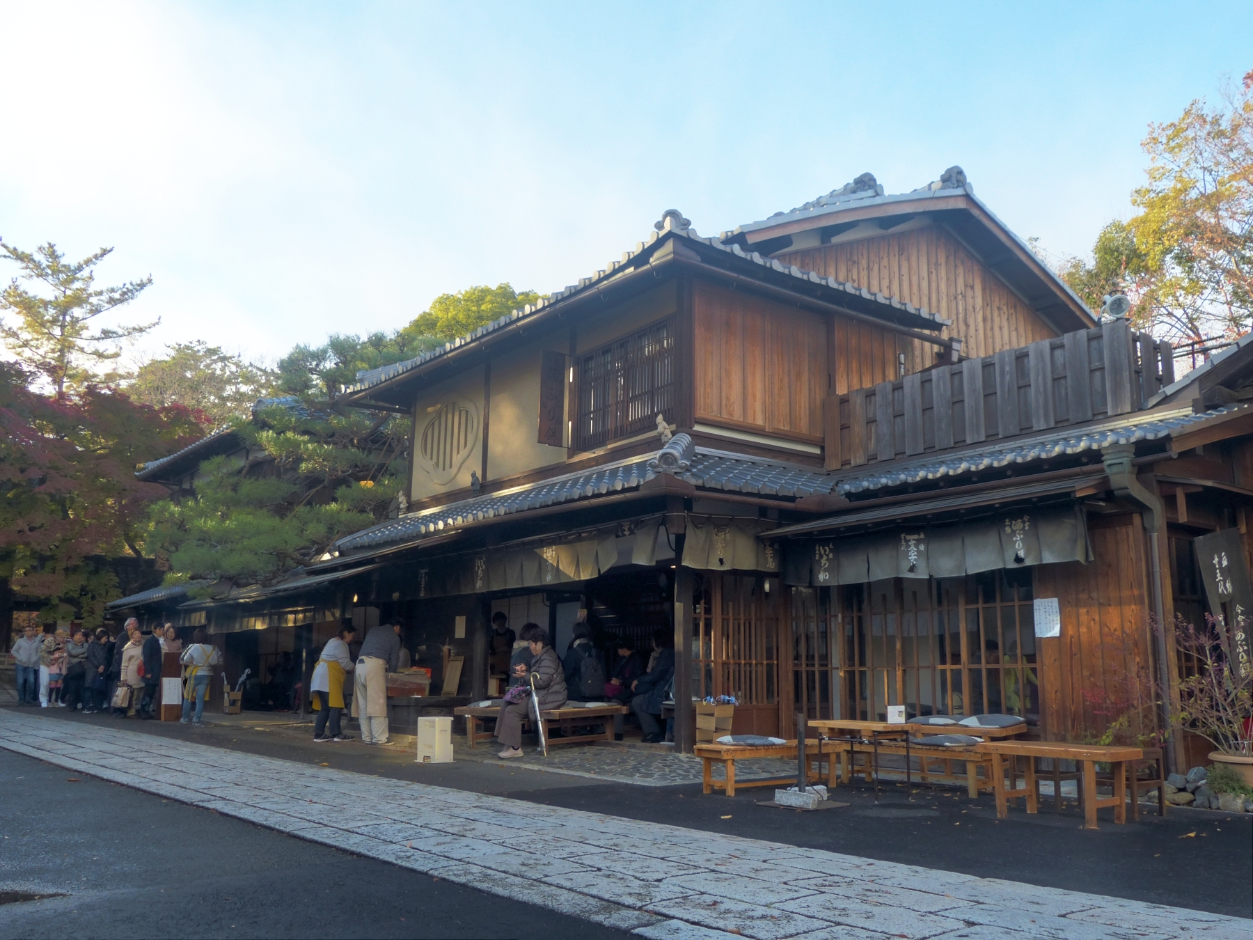 京都市、今宮神社の横にある老舗のあぶり餅屋「一文字屋和輔(一和)」の店舗。(HDRのため人物にブレ有)